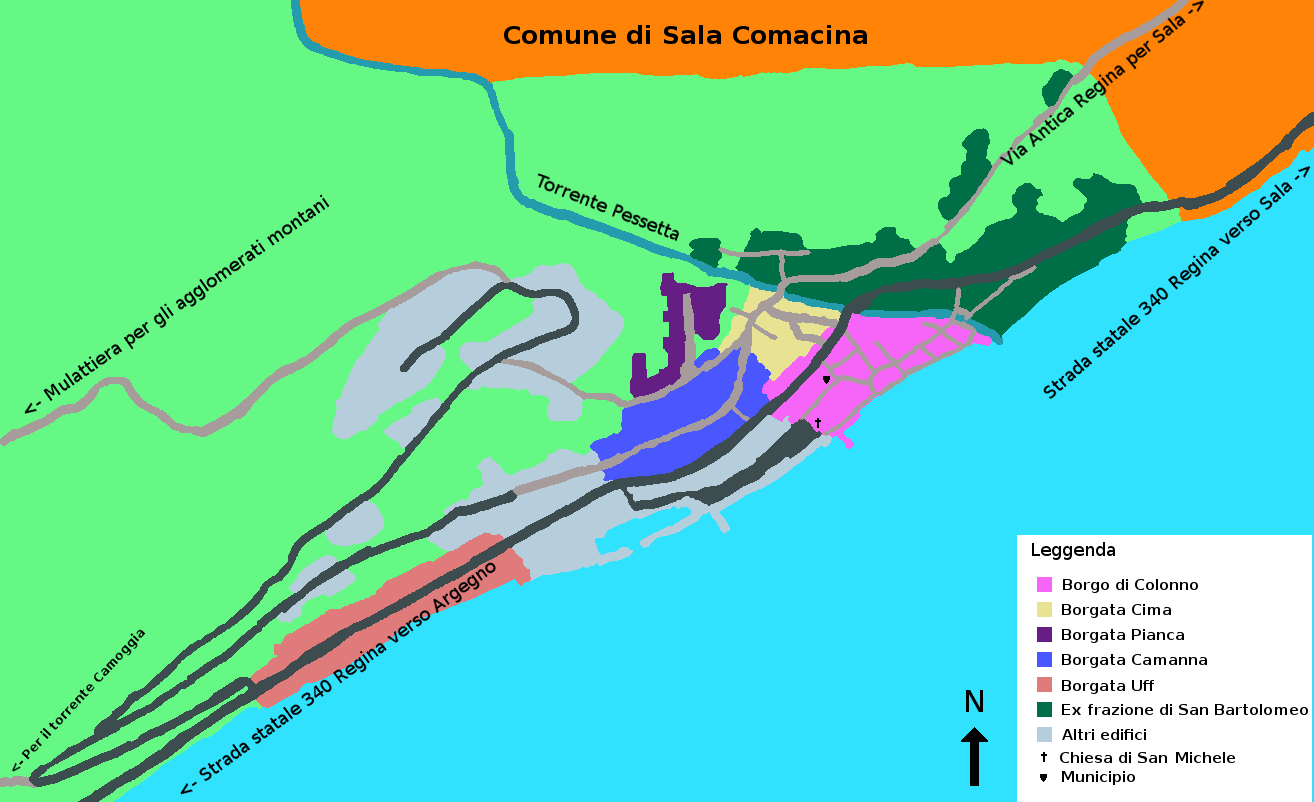 Mappa di Colonno con la suddivisione delle borgate storiche